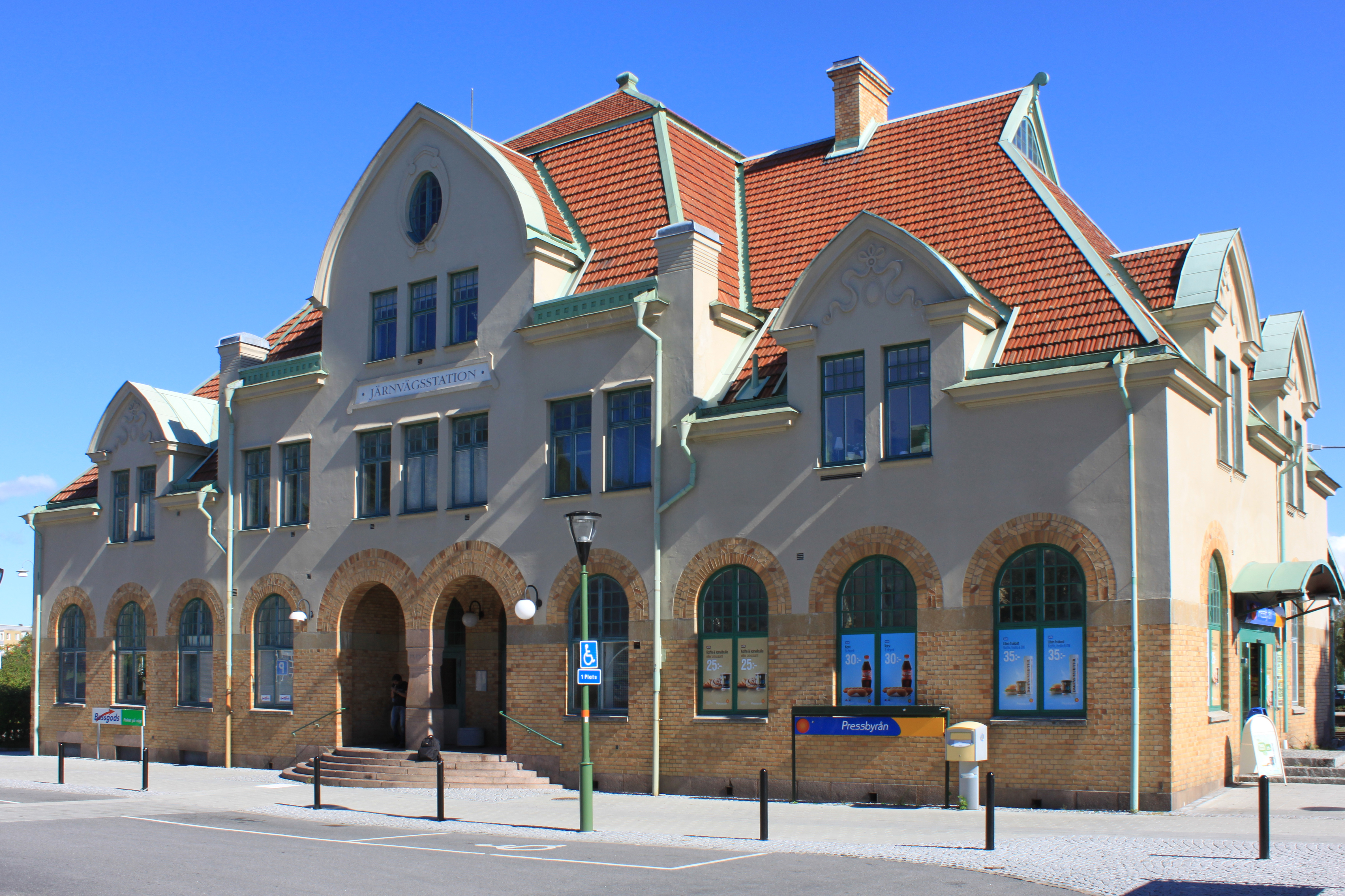 Mariestads stationshus, Gamla Staden 3:2.